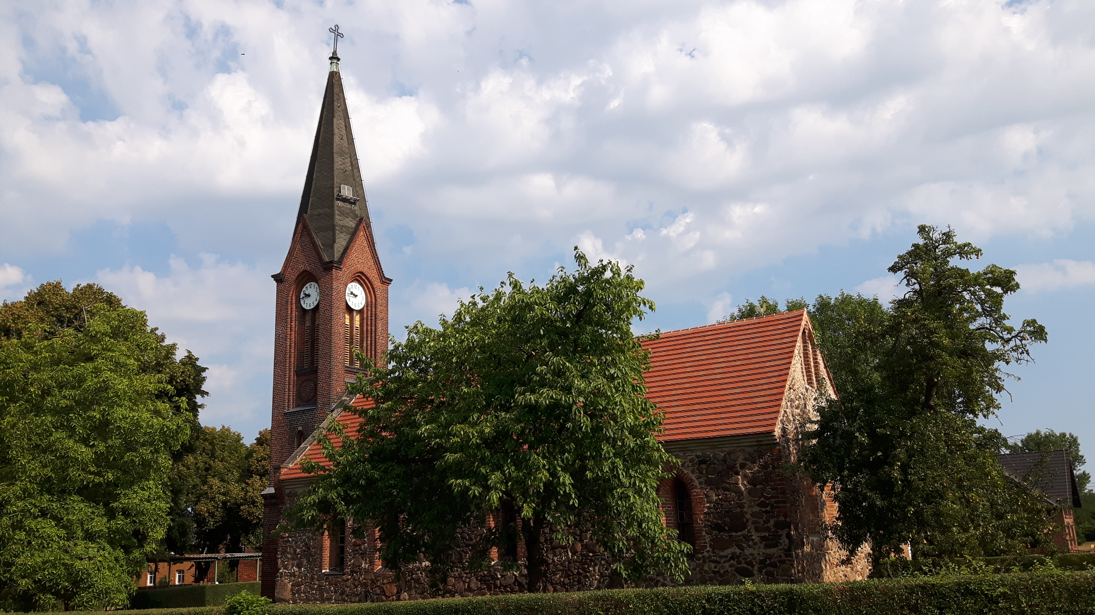 Die Dorfkirche Bischdorf gehört und dient einer lutherischen Gemeinde der unierten Evangelischen Kirche Berlin-Brandenburg-Schlesische Oberlausitz. Sie befindet sich in Bischdorf, einem Ortsteil der Stadt Lübbenau/Spreewald, Landkreis Oberspreewald-Lausitz in Brandenburg. Vermutlich im 14. Jahrhundert errichtet, wurde sie etwa im Jahr 1900 saniert und um ihren Turm ergänzt. Hier ist die Kirche aus südöstlicher Richtung aufgenommen.